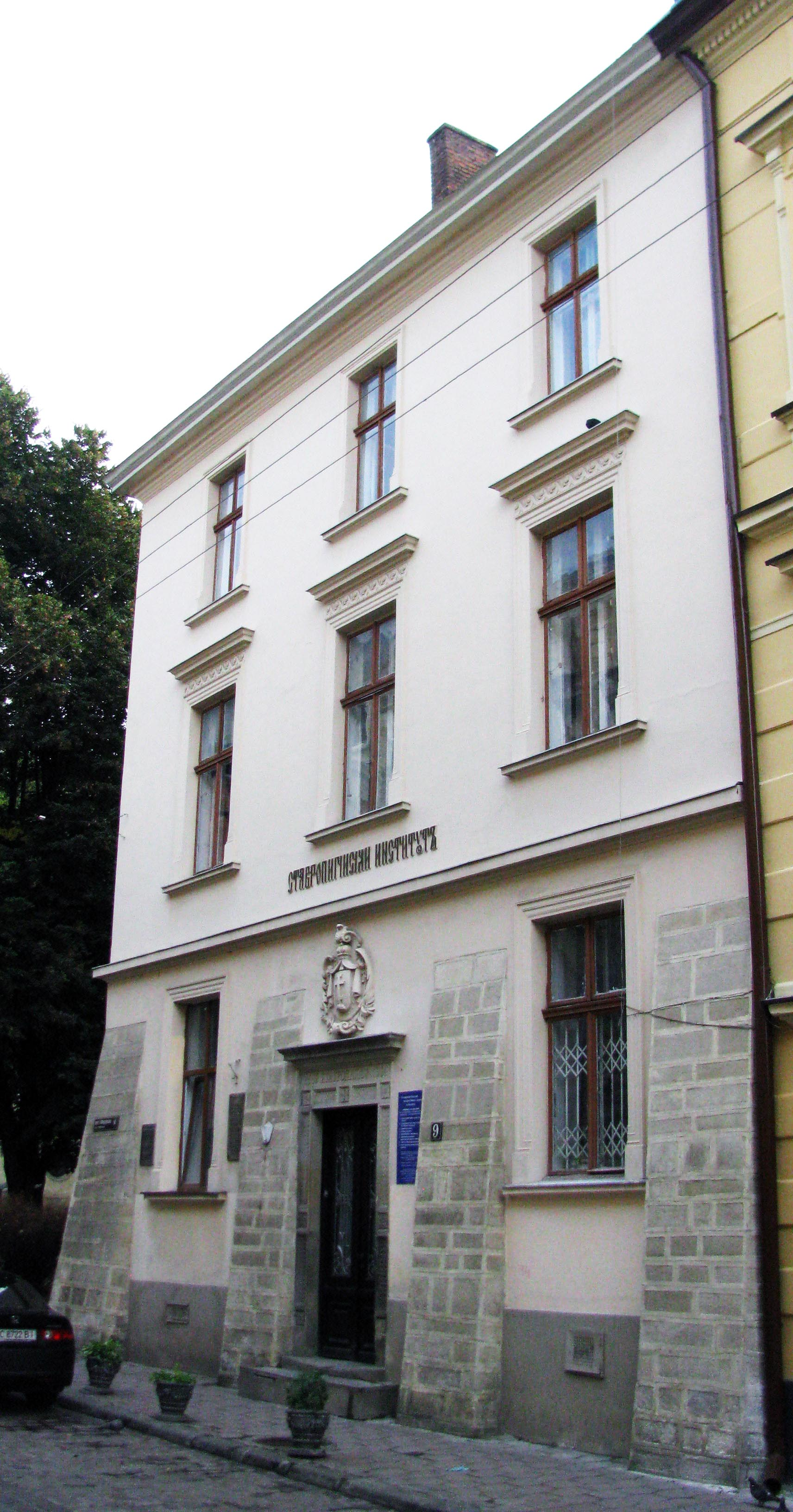 Будинок №9 на вулиці Федорова Львів